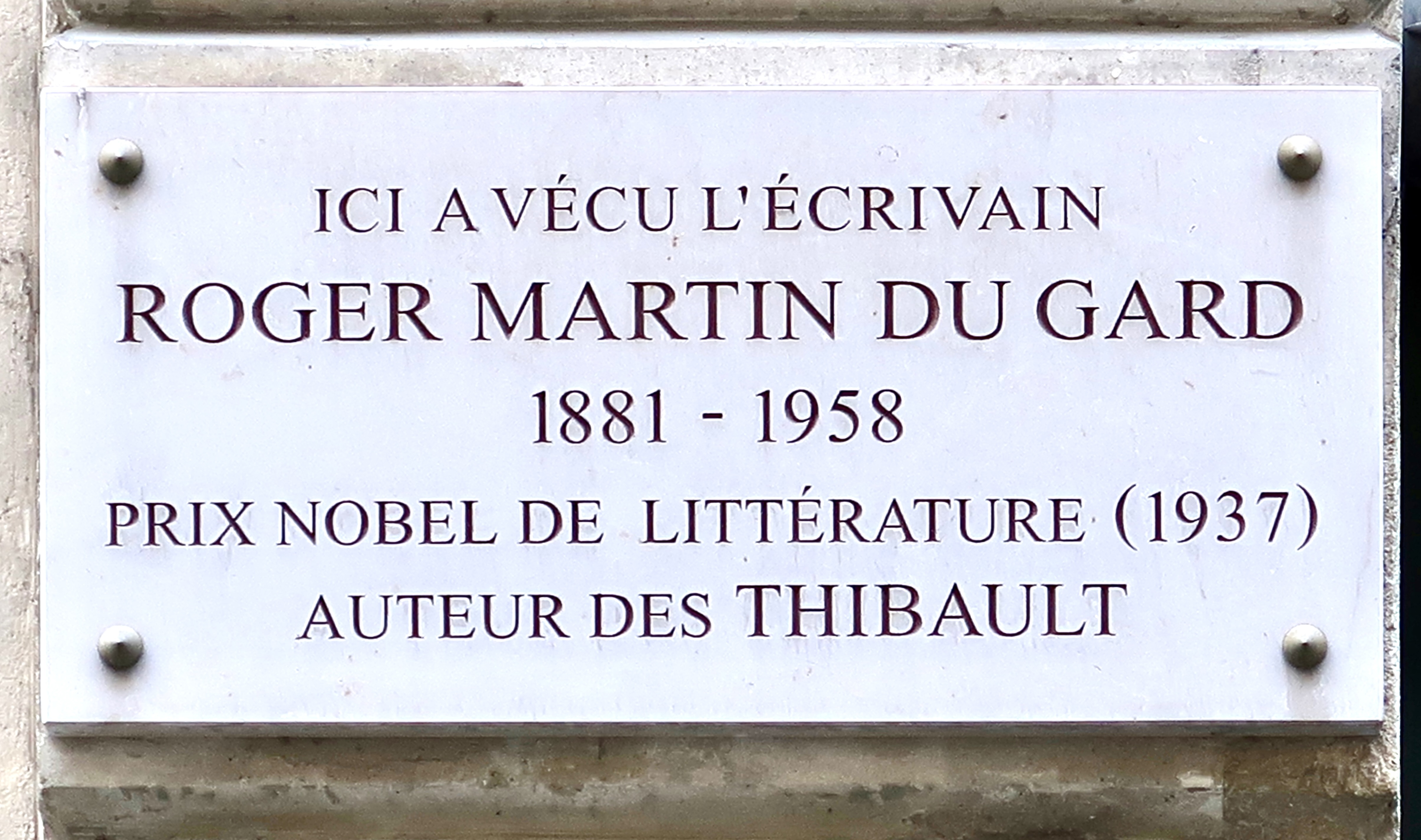 Plaque en hommage à Roger Martin du Gard, 10 rue du Dragon (Paris, 6e).